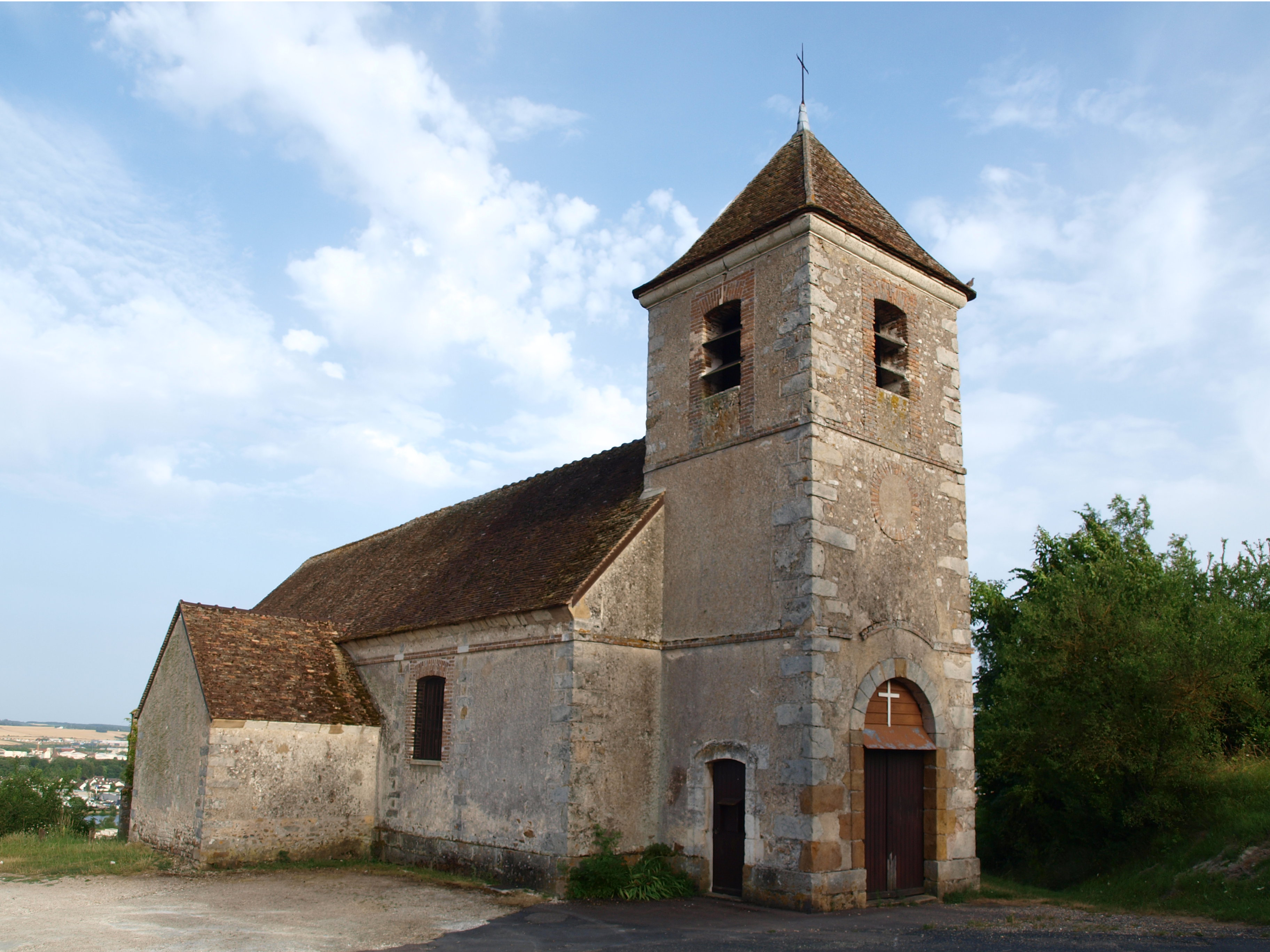 Saint-Martin-du-Tertre (Yonne, France) , l'église.